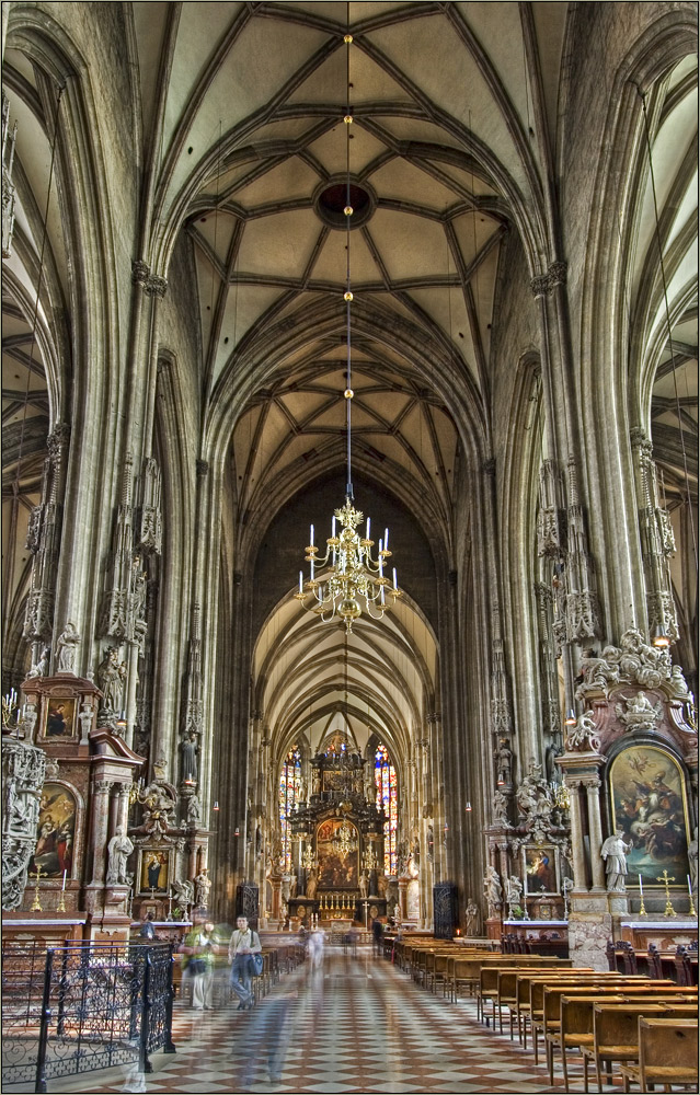 Innenansicht des Stephansdoms